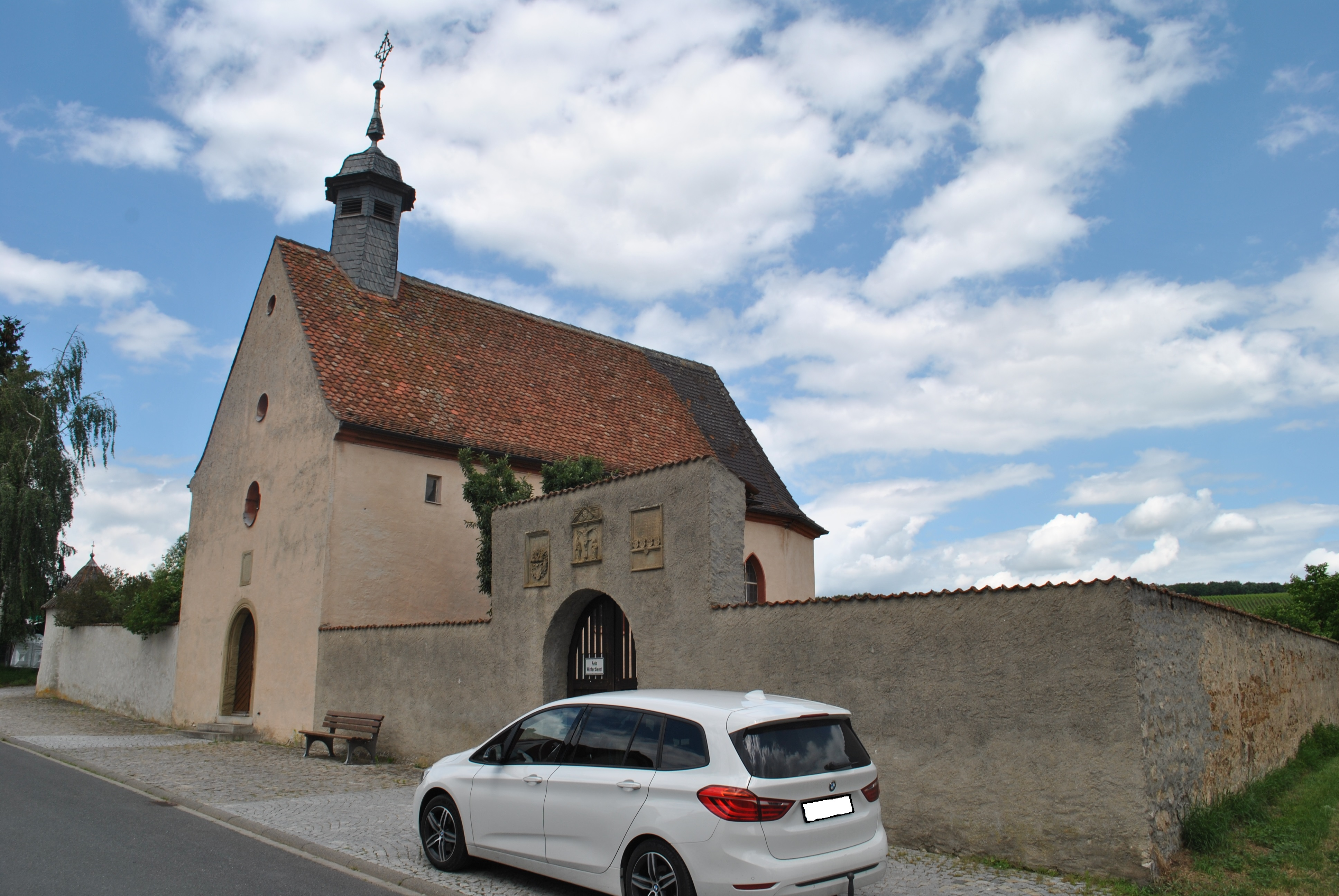 Katholische Friedhofskapelle St. Michael Einfacher Bau mit Dachreiter, 1716; mit AusstattungThis is a photograph of an architectural monument.